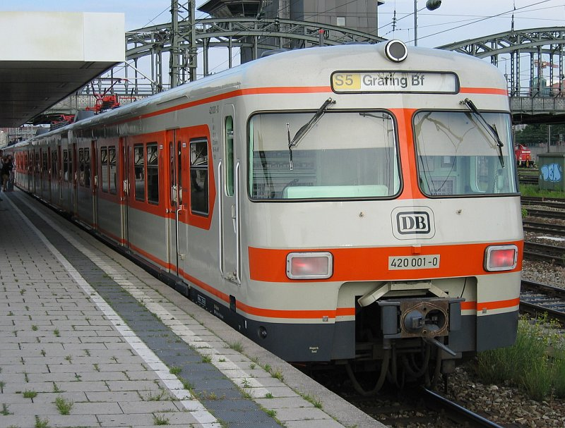 S-Bahn München (Munich's suburban rail) at the station Hackerbrücke